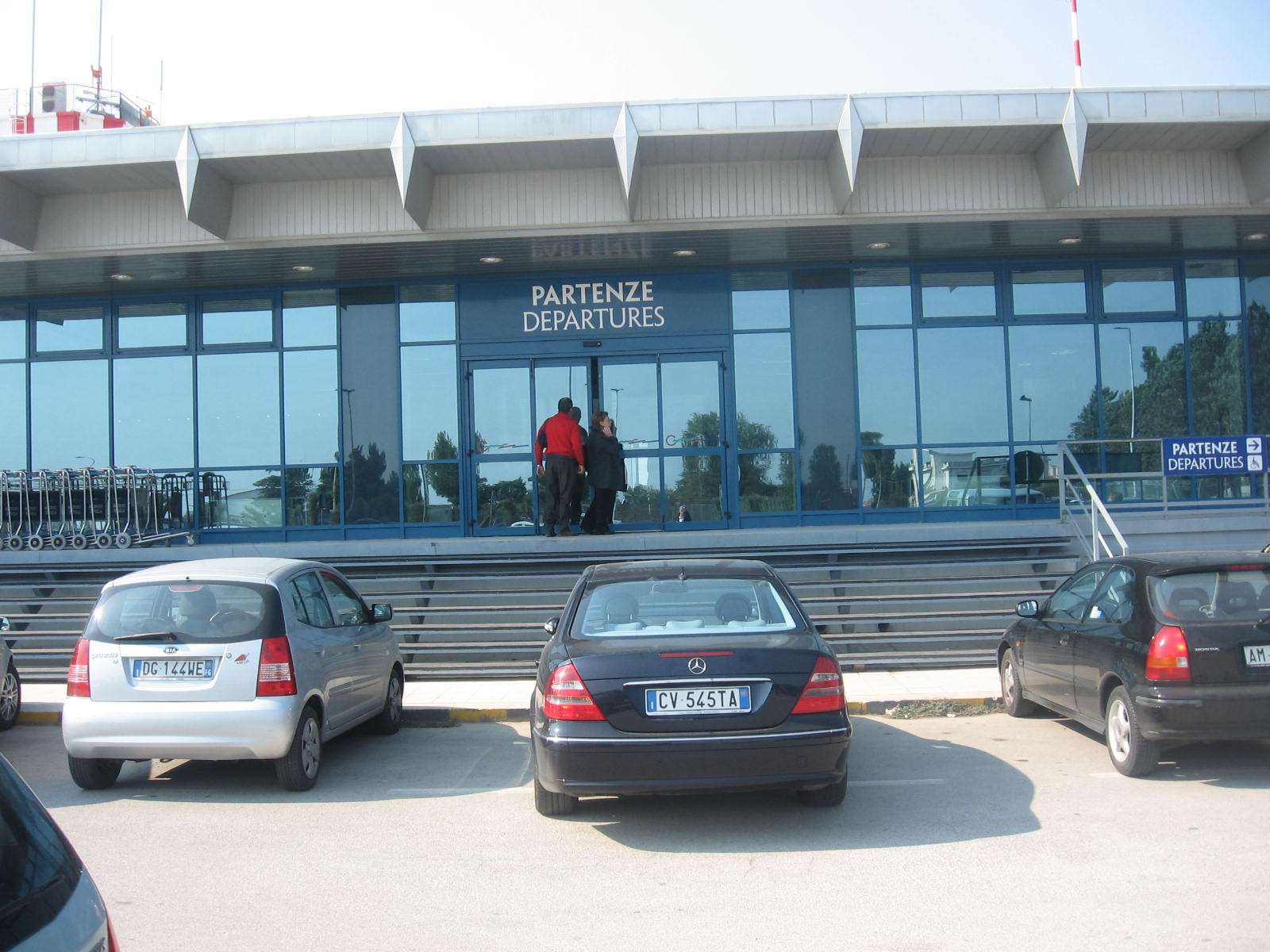 Ingresso Aeroporto Gino Lisa di Foggia